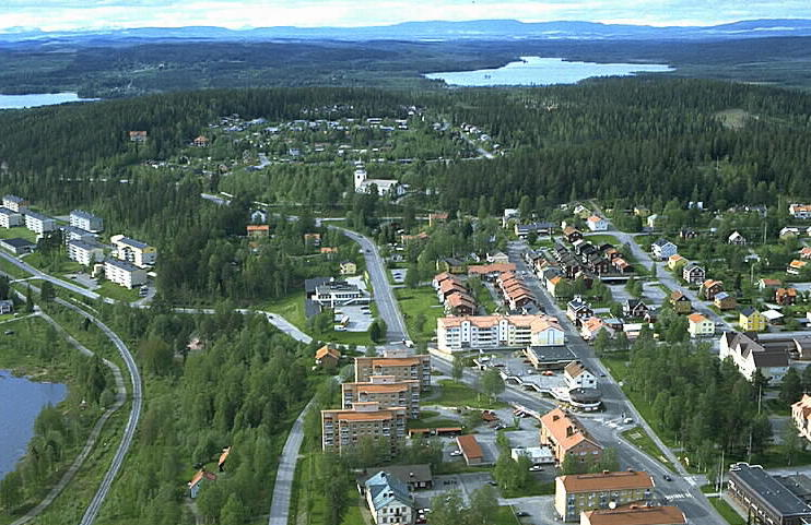 Motiv: Vilhelmina Nyckelord: Flygbilder, Riksintressen Kategori: Miljöer, Tätort Vilhelmina